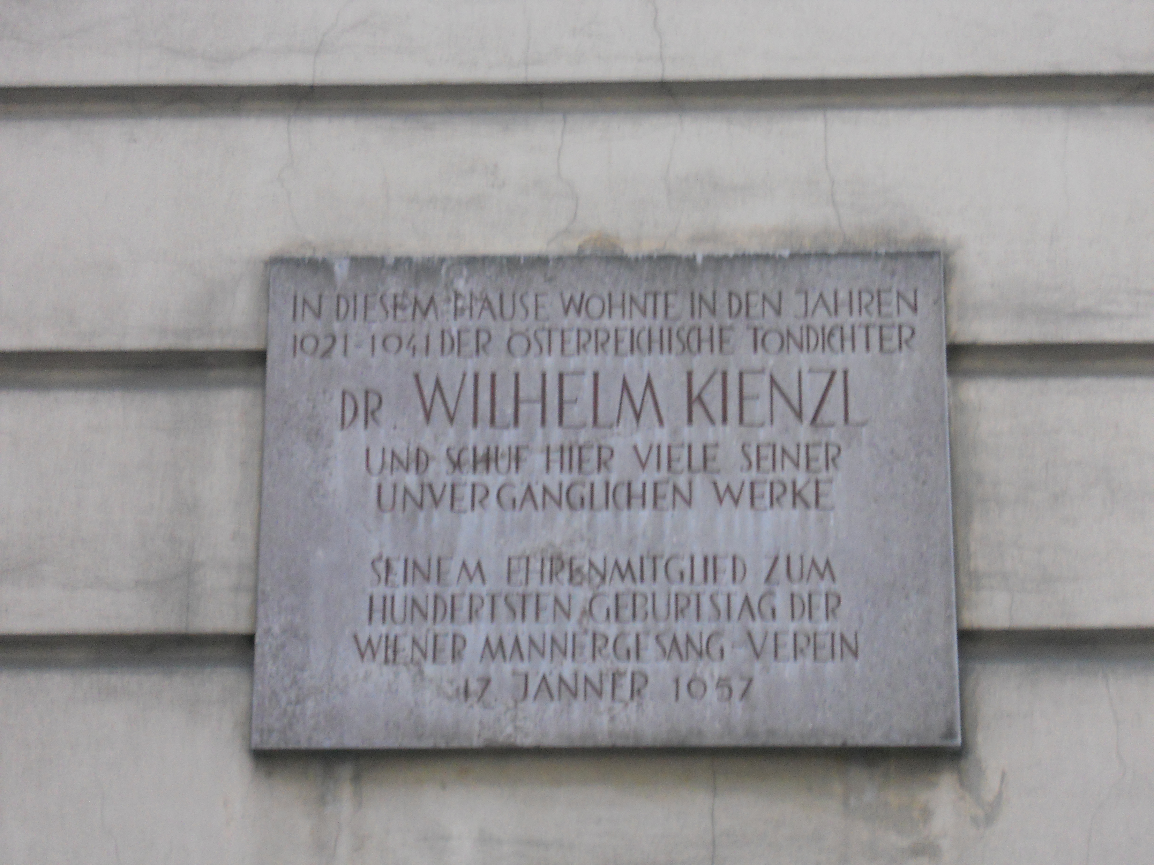 Gedenktafel für Wilhelm Kienzl auf dem Haus Schreygasse 6 in Wien